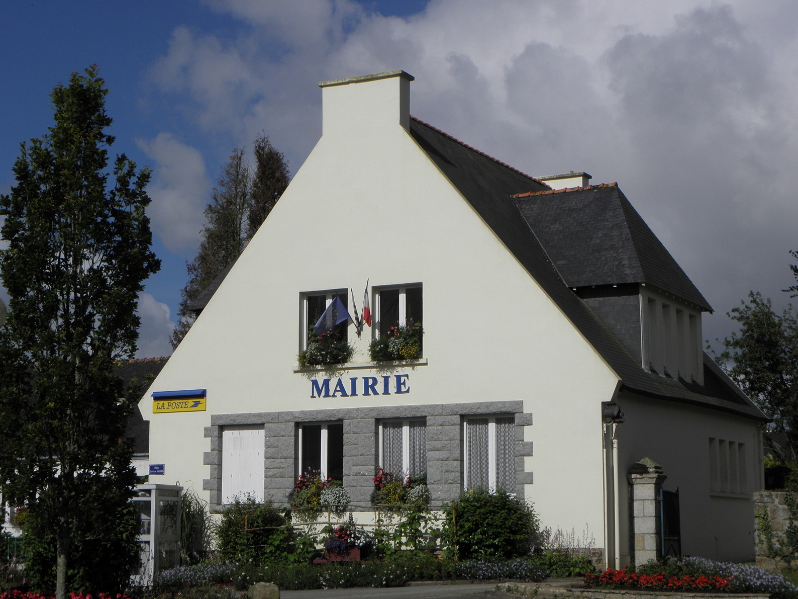 Mairie de Tourc'h (29).